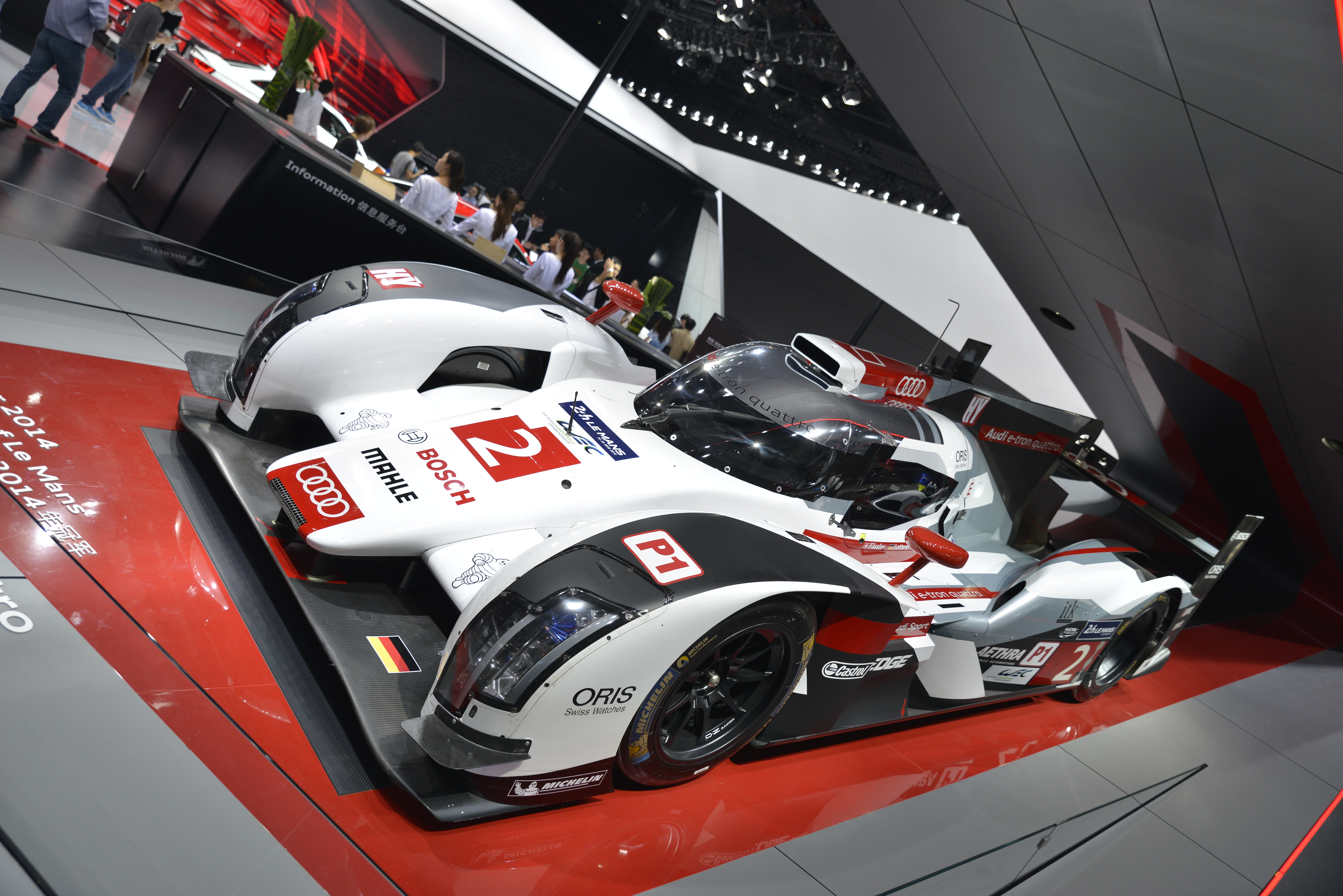 Audi R18 2015 Auto Shanghai 2015